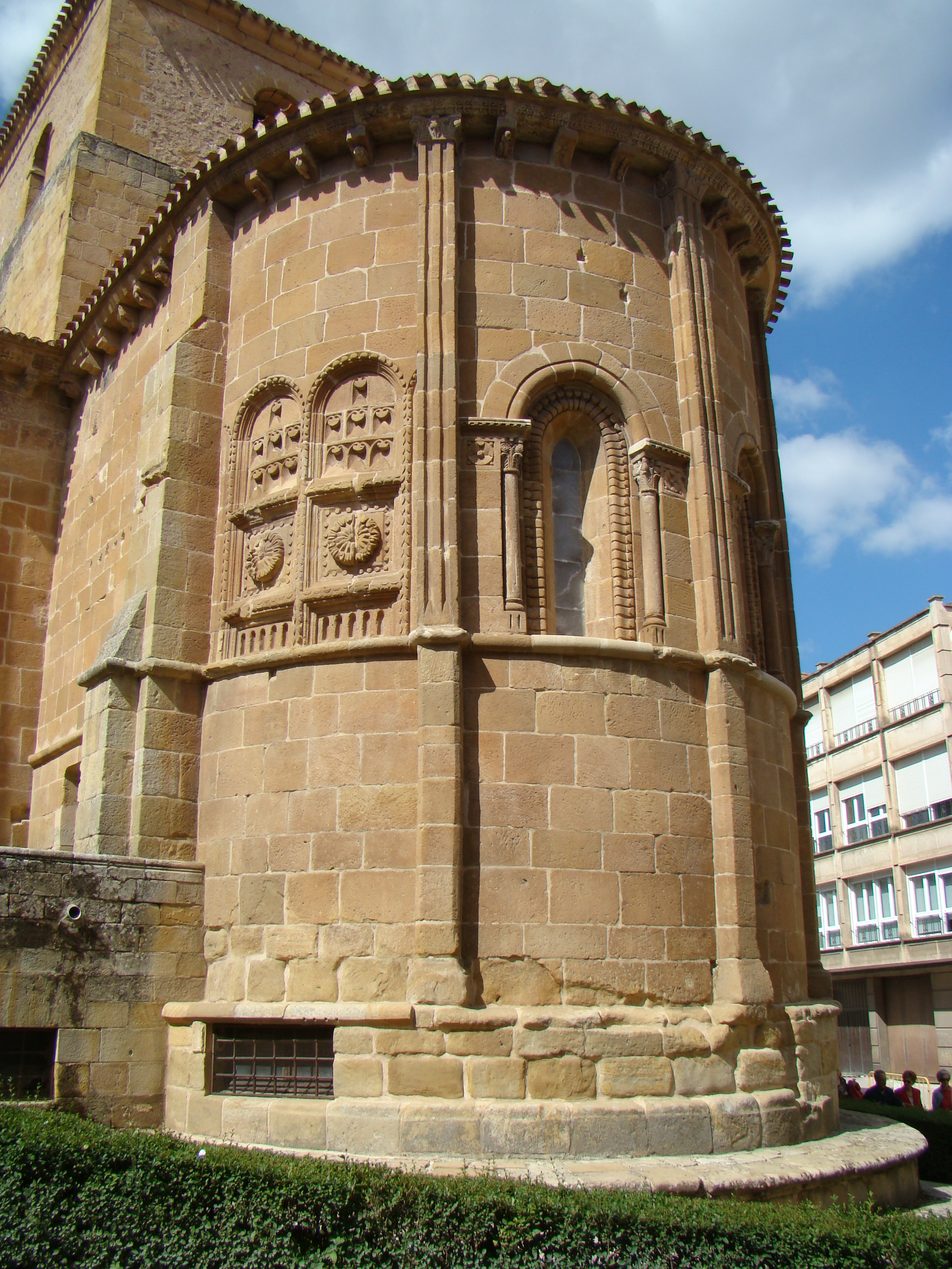 Ábside románico de la iglesia de San Juan de Rabanera en Soria (España). Se ven los contrafuertes que imitan una pilastra estriada con capitel.